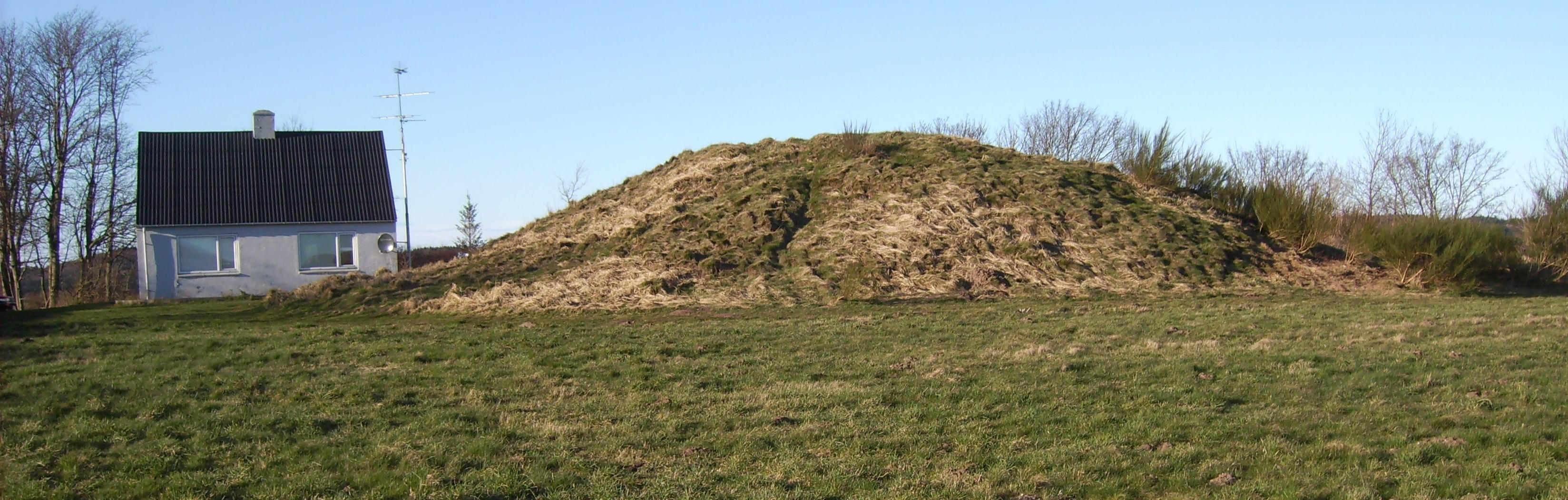 A Passage grave (Blakshøj ved Gærum), with the number SB 70, in the parish Gærum in Frederikshavn municipality, Denmark. SB 70 (Stednavne: "Blakshøj"/ Gjødegaard), Gærum sogn, Frederikshavn Kommune. Anlæg SB 70 (Blakshøj ved Gærum), rundhøj (Diam. 26 m & højde 4, 2 m) fra Tragtbægerkultur med et kammer (megalitgrav – jættestue – fra Tragtbægerkultur), har en længde 8 m, er 1, 75 m høj og 1-2, 5 m bred. Væggene er opbygget af 15 store sten, som bærer fem svære dæksten. Ved en undersøgelse i August 1882 blev Jættestuen helt udgravet, og i gravkammeret fandtes 3 flade meisler og en flintflække. Fra gangen bronzesværdet (B 1495), sek. udnyttelse af gravrum (ældre bronzealder per.3). Source: SB 70